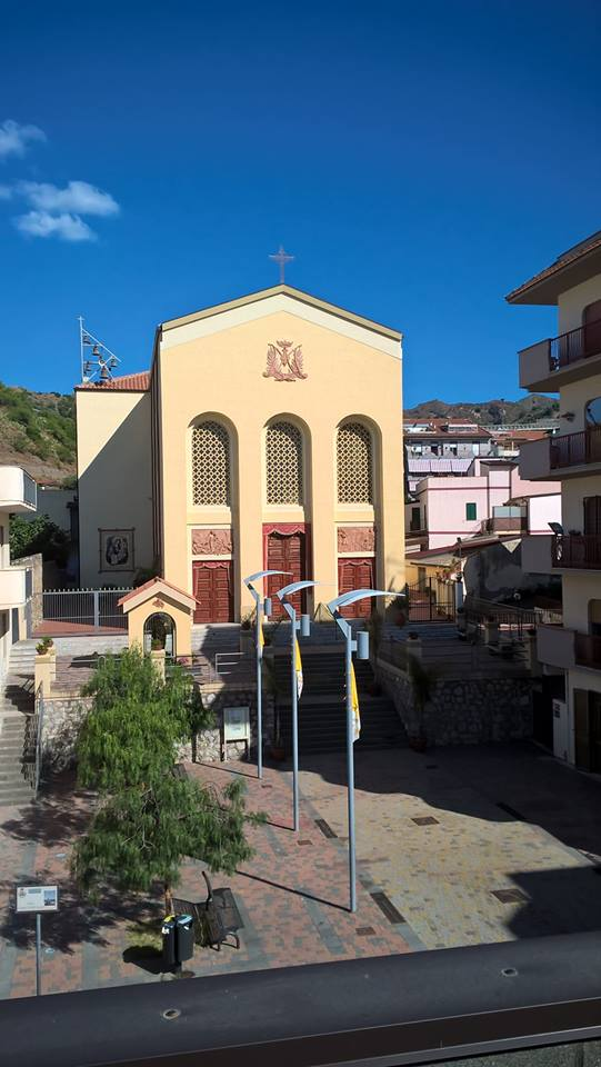 Chiesa e piazza Portosalvo